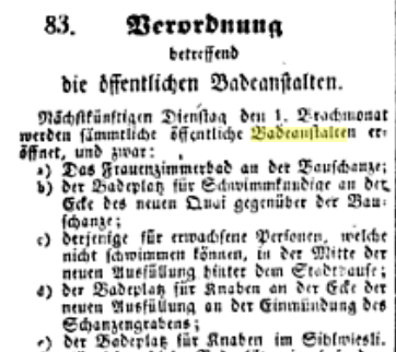 Ausschnitt aus dem Zürcherischen Wochenblatt 34, 1839